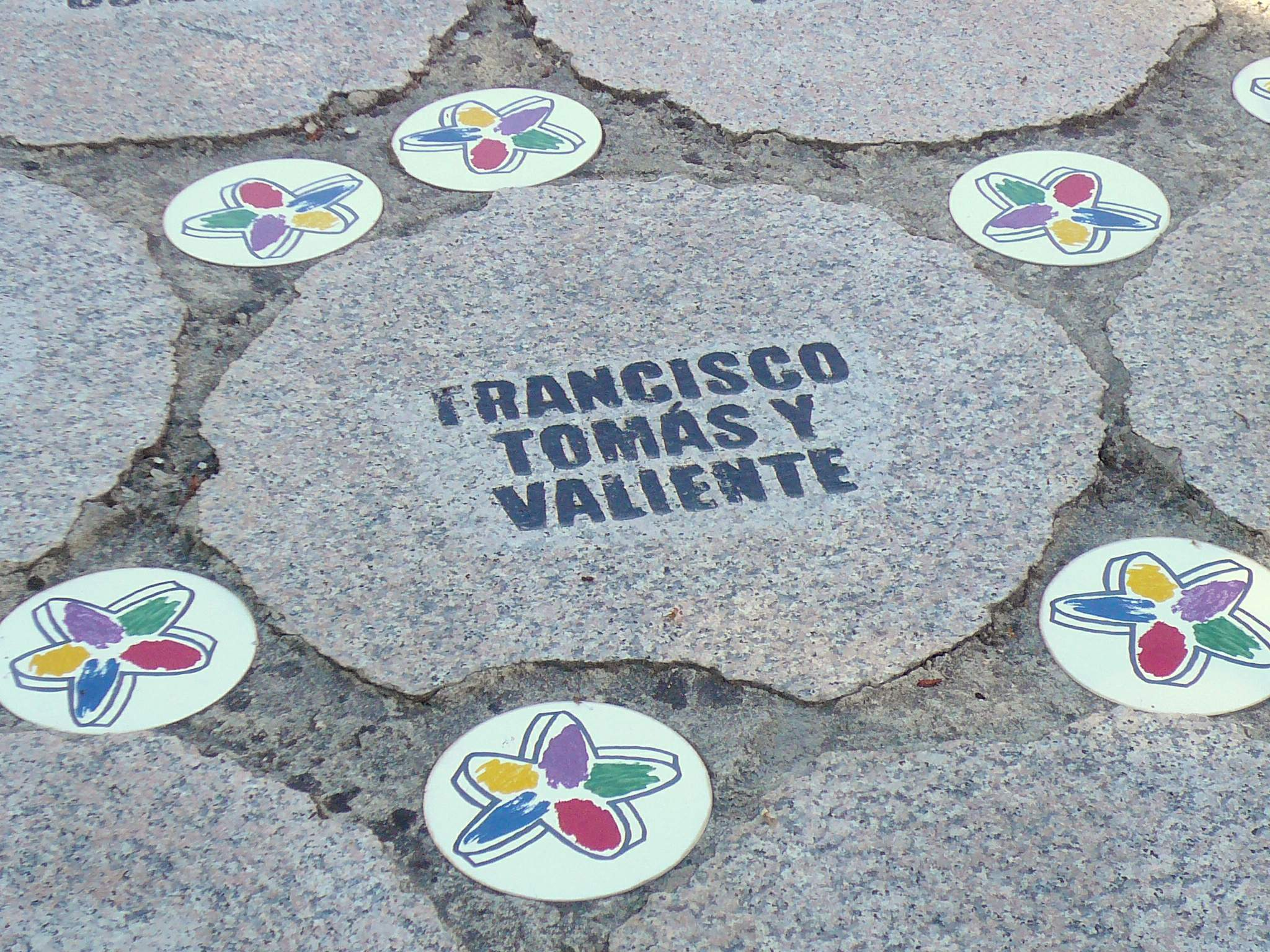 Monumento a las Victimas de ETA (Vitoria)